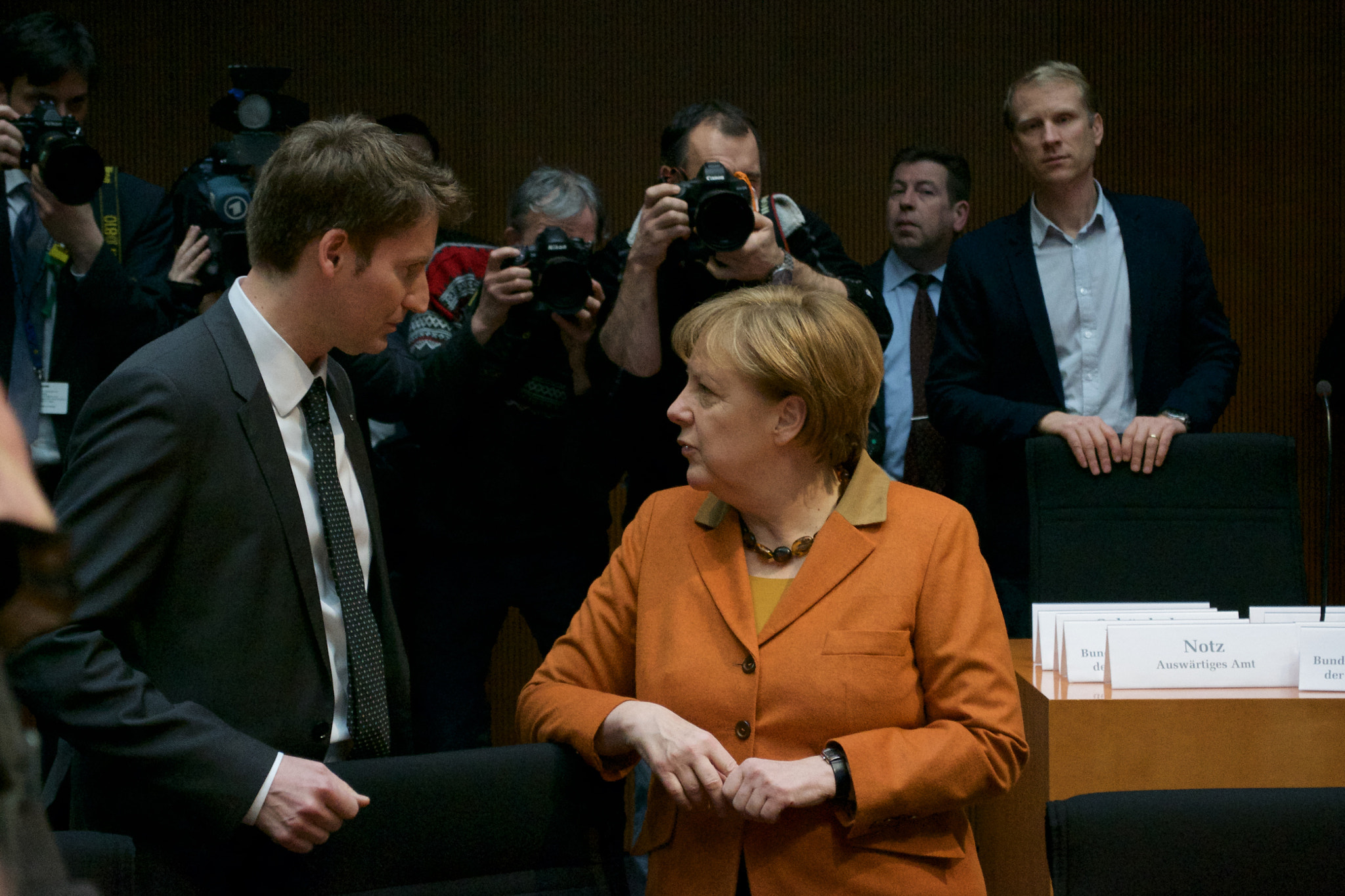 500px provided description: Bundeskanzlerin Angela Merkel und Ausschussvorsitzender Patrick Sensburg im NSA-Untersuchungsausschuss am 16.02.2017 [#Geheimdienst ,#Parlament ,#Patrick ,#Union ,#Bundestag ,#Angela ,#Merkel ,#Kanzleramt ,#Podcast ,#NSA ,#CDU ,#Kanzlerin ,#GCHQ ,#BND ,#Nachrichtendienst ,#Sensburg ,#Ausschuss ,#Geheimdienst-Untersuchungsausschuss ,#NSA-Untersuchungsausschuss ,#NSAUA ,#Technische Aufkla?rung ,#Five Eyes ,#Untersuchungsausschuss ,#Vorsitzender]